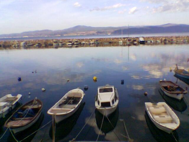 Mudanya, Bursa, Turkey